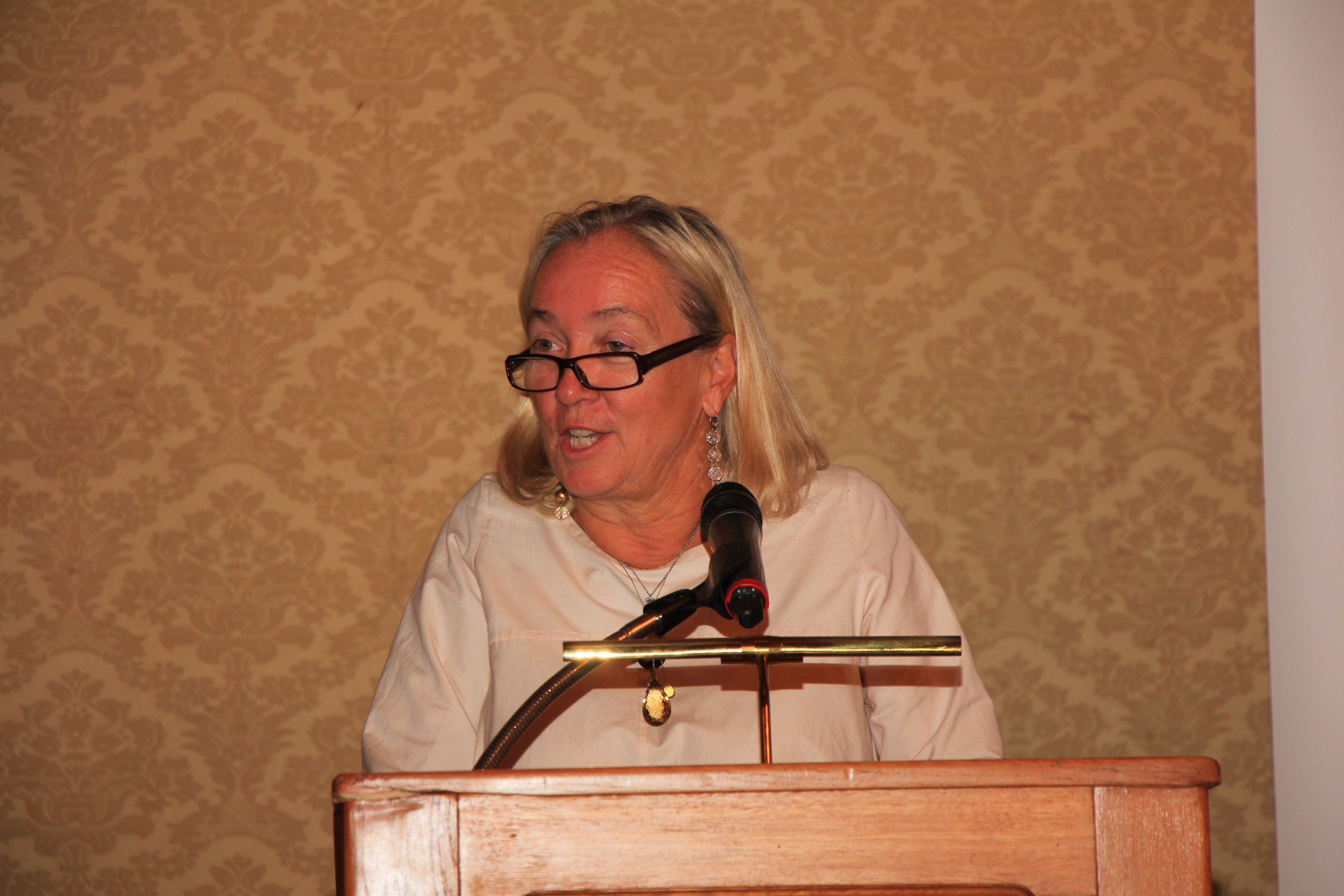 Generalversammlung der Organisation Blue Shield International im Wiener Rathaus. Am Wort ist Agnes Husslein